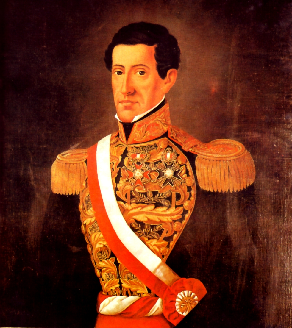 Agustín Gamarra Mesía (1785 - 1841), político y militar peruano que fue Presidente del Perú en dos periodos: de 1829 a 1833 y de 1839 a 1841.